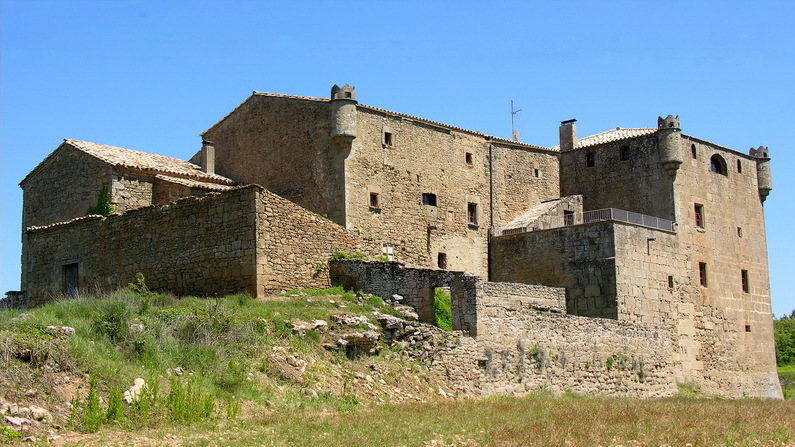 Part posterior del conjunt